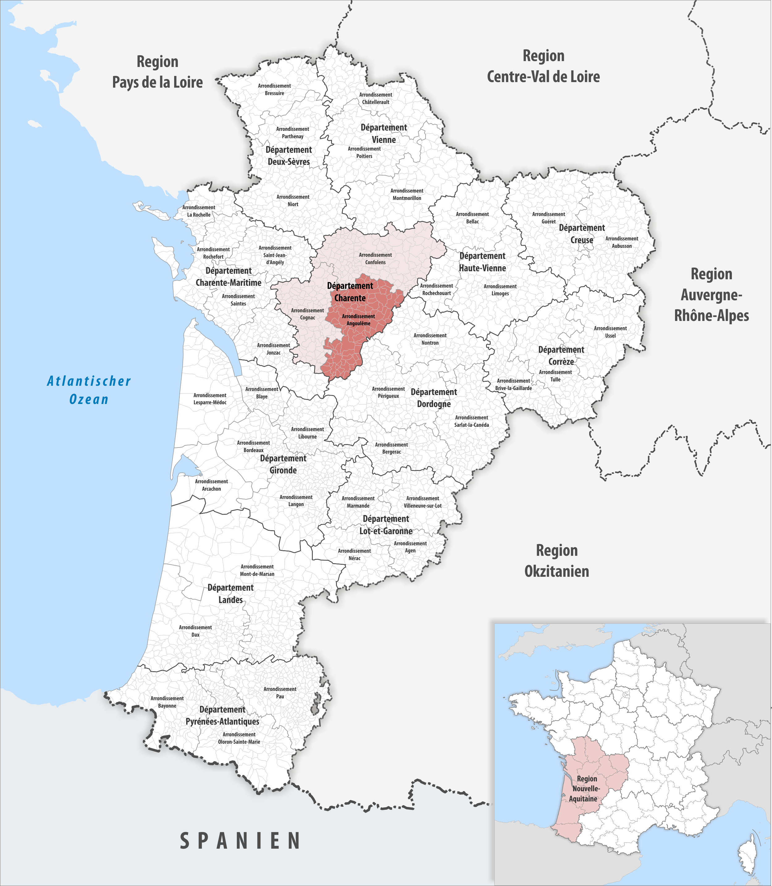 Lage des Arrondissements Angoulême